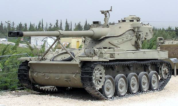 AMX-13 ביד לשריון בלטרון. התמונה צולמה על ידי.